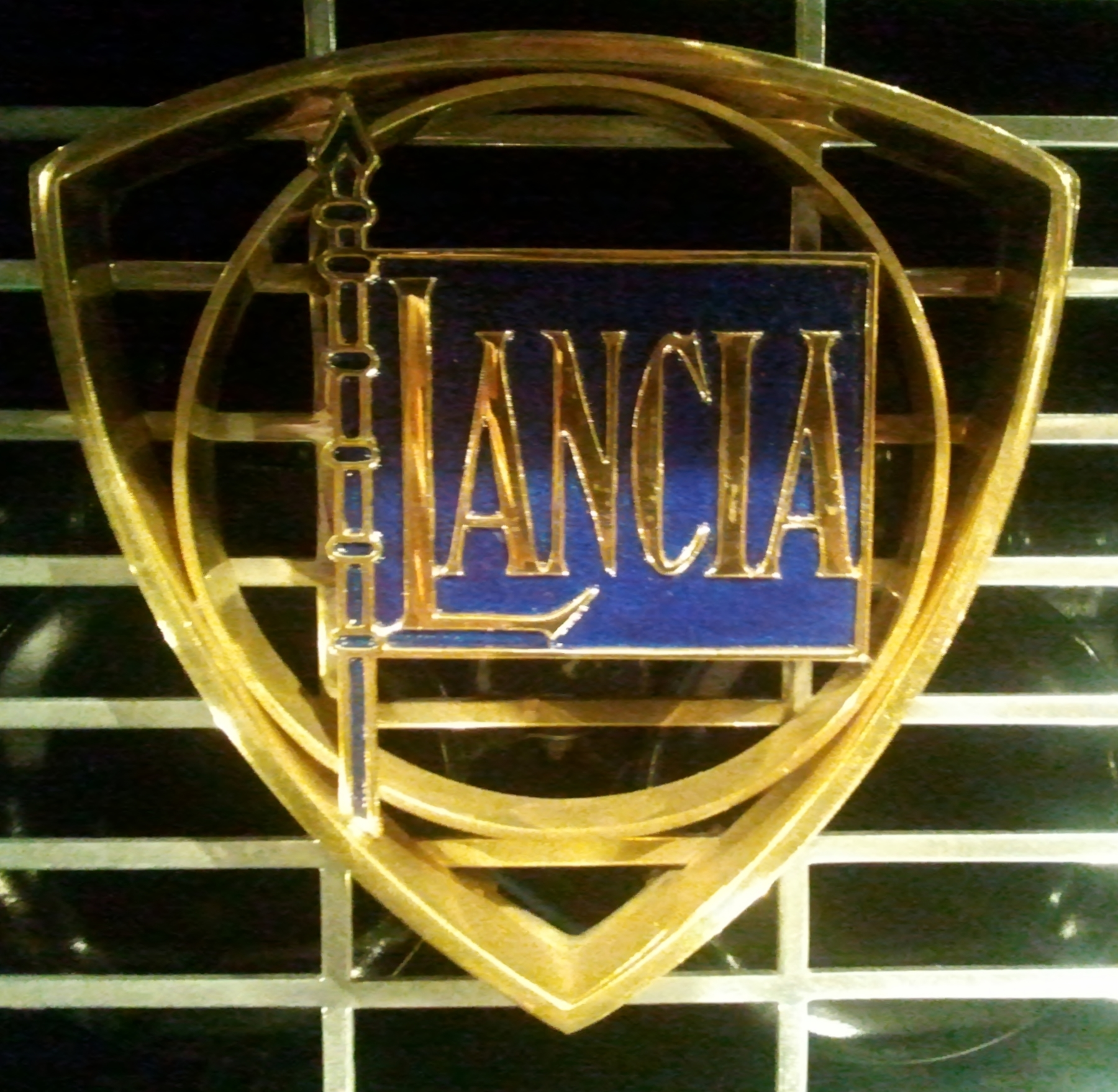 1957 Lancia logotype